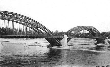 Lyon : le pont de la Boucle